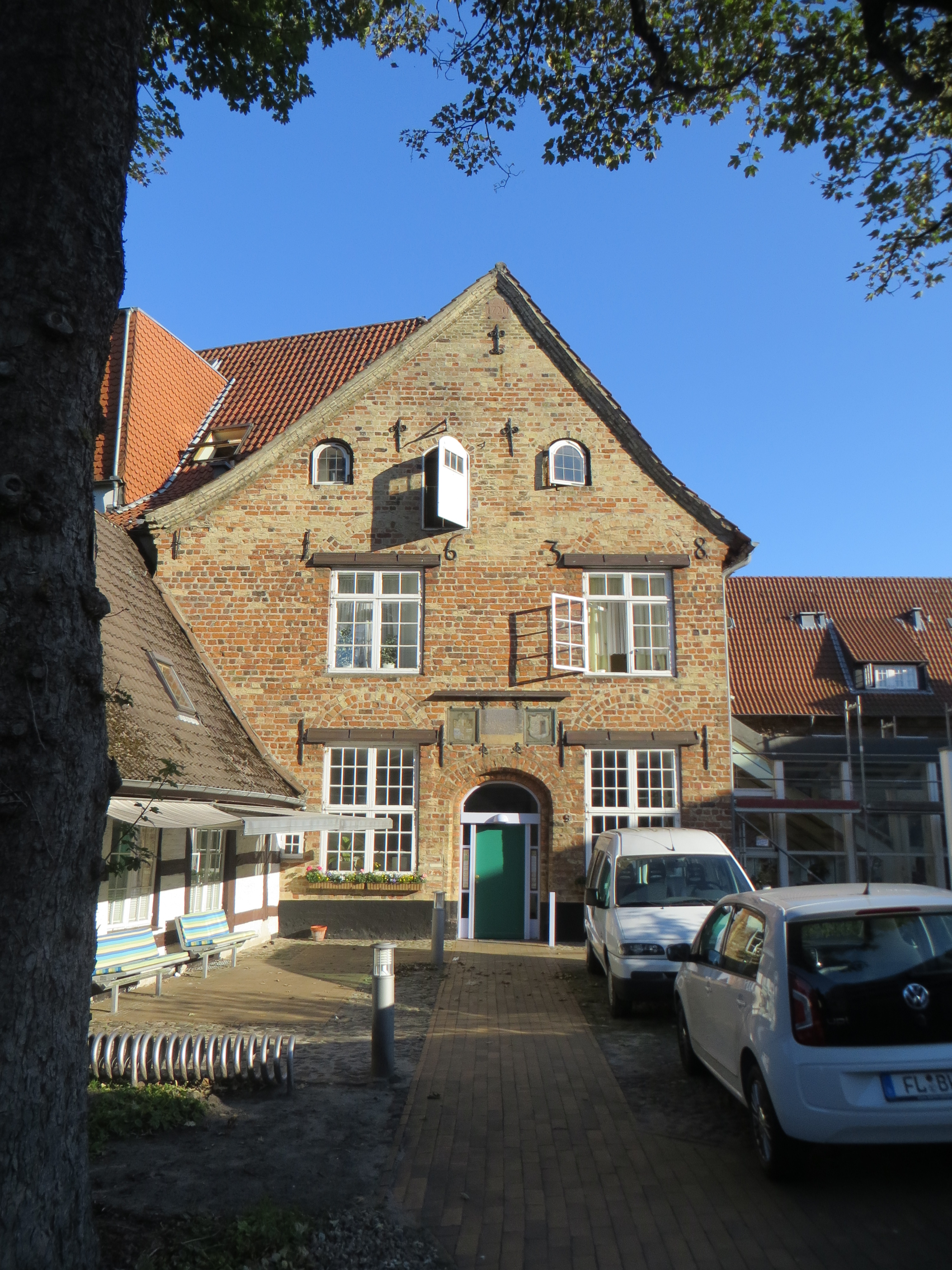 Franziskanerkloster Flensburg, Eingang, Bild 2